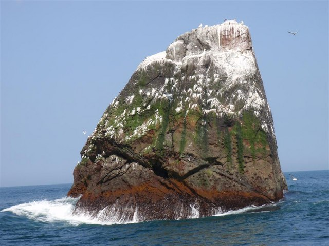 Rockall